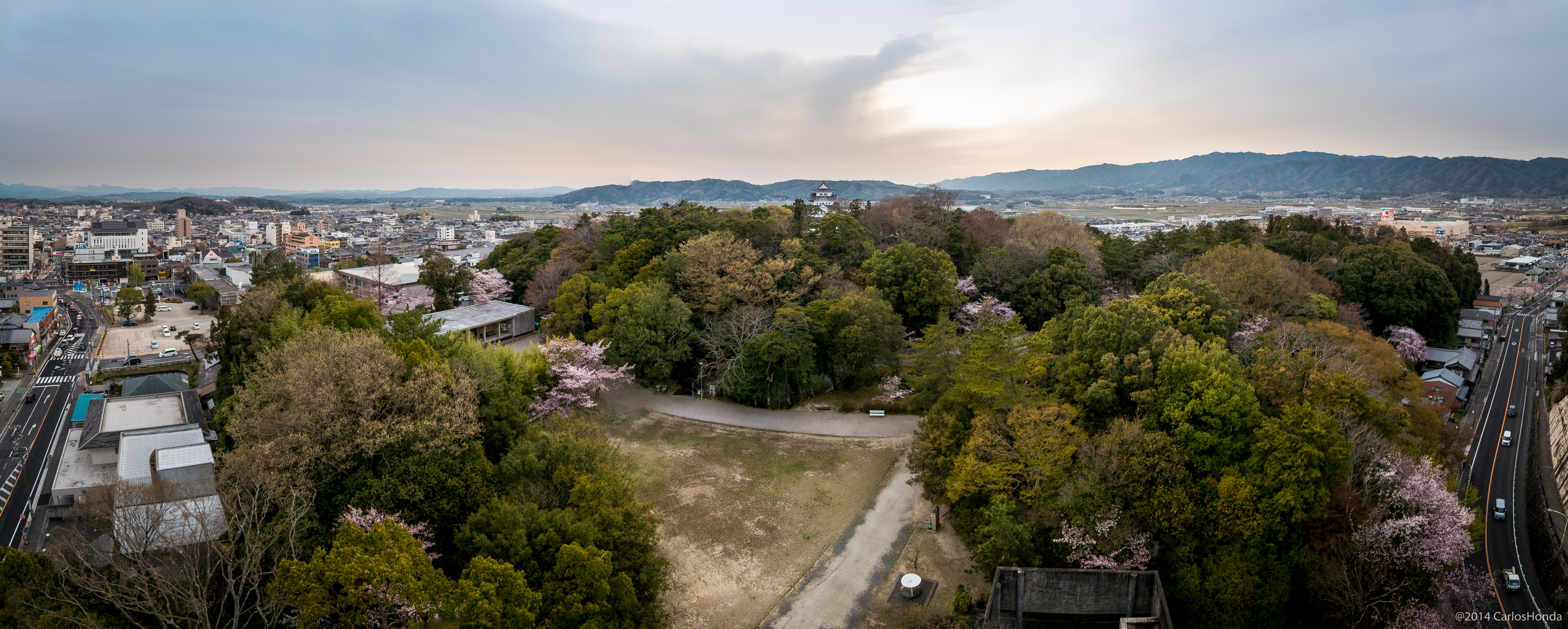 140412-1651 Ueno Park, Iga